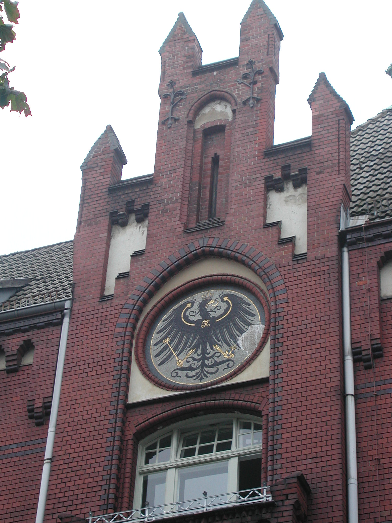 Rathaus Lichtenberg - Der Preußische Adler an der Rathaus-Fassade in der Rathausstraße